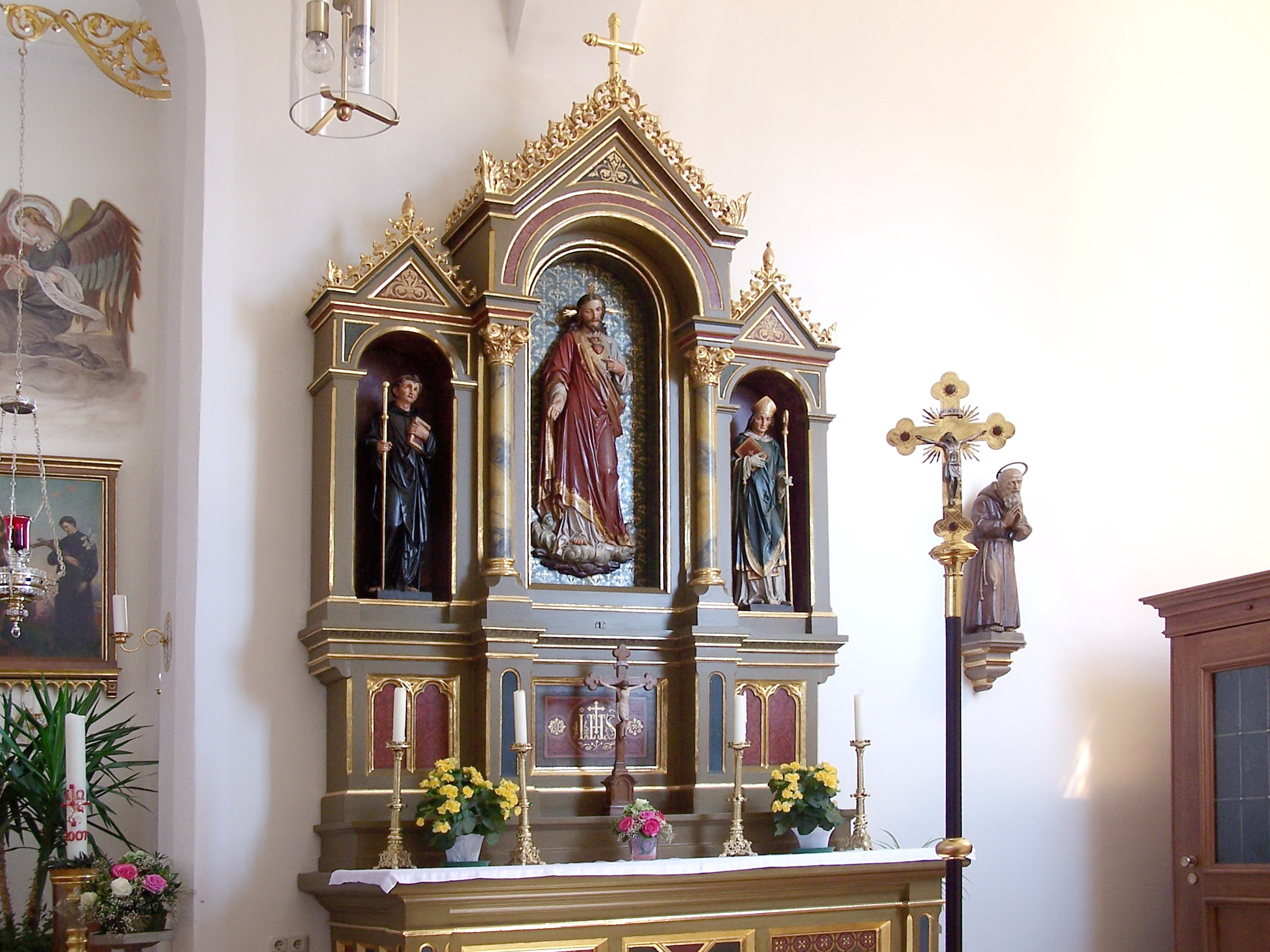 Furth in Niederbayern, Schatzhofen Nr. 14. Pfarrkirche St. Michael. Saalkirche mit Chorturm, Chor romanisch, 12. Jahrhundert, Langhaus 1687/88 von Victor Thoni, mit Lisenen- und Putzgliederung. Rechter Seitenaltar: Herz-Jesu.